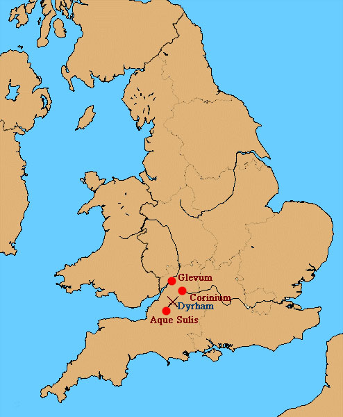 Bro Saoz. Dyrham. Emgann